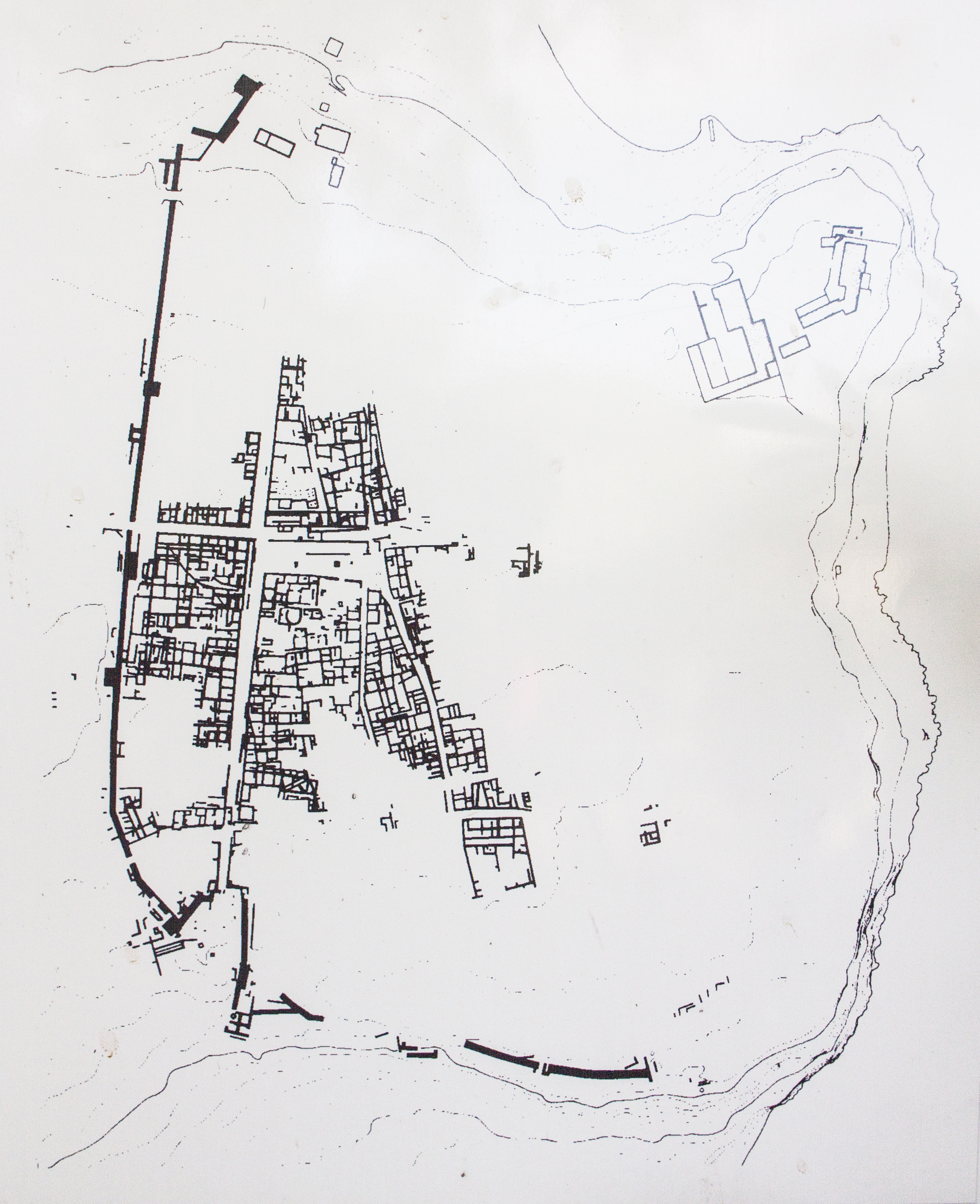 Planimetria di Megara Hyblaea